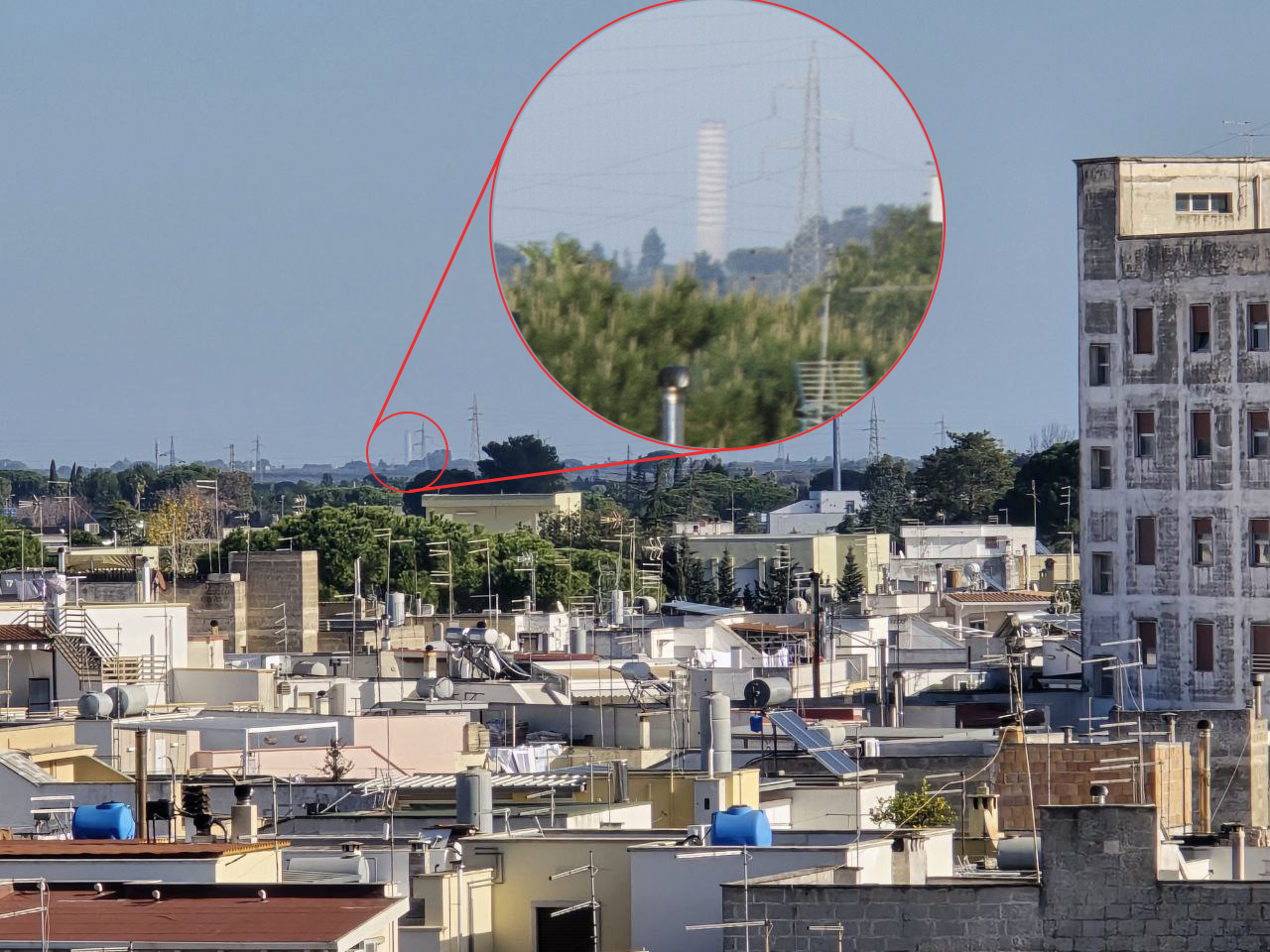 La ciminiera alta 200 metri della centrale termoelettrica Federico II di Cerano, vista da Francavilla Fontana a 40 chilometri di distanza.